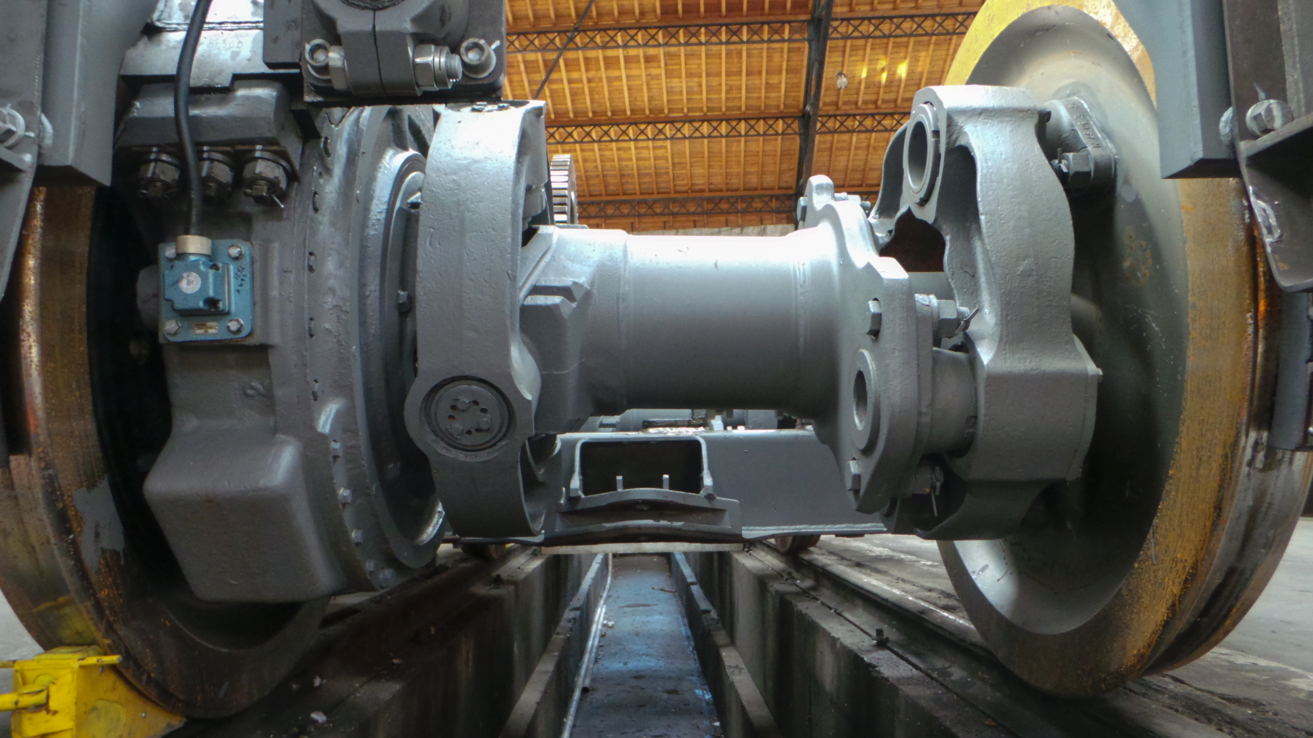 Un bogie Jacquemin dans la rotonde du dépot SNCF de Chambéry / Chambéry, Savoie, France